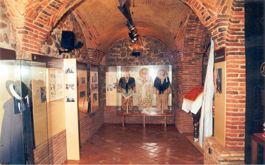 Foto del interior del Museo de la "Octava del Corpus" de Peñalsordo, Badajoz.